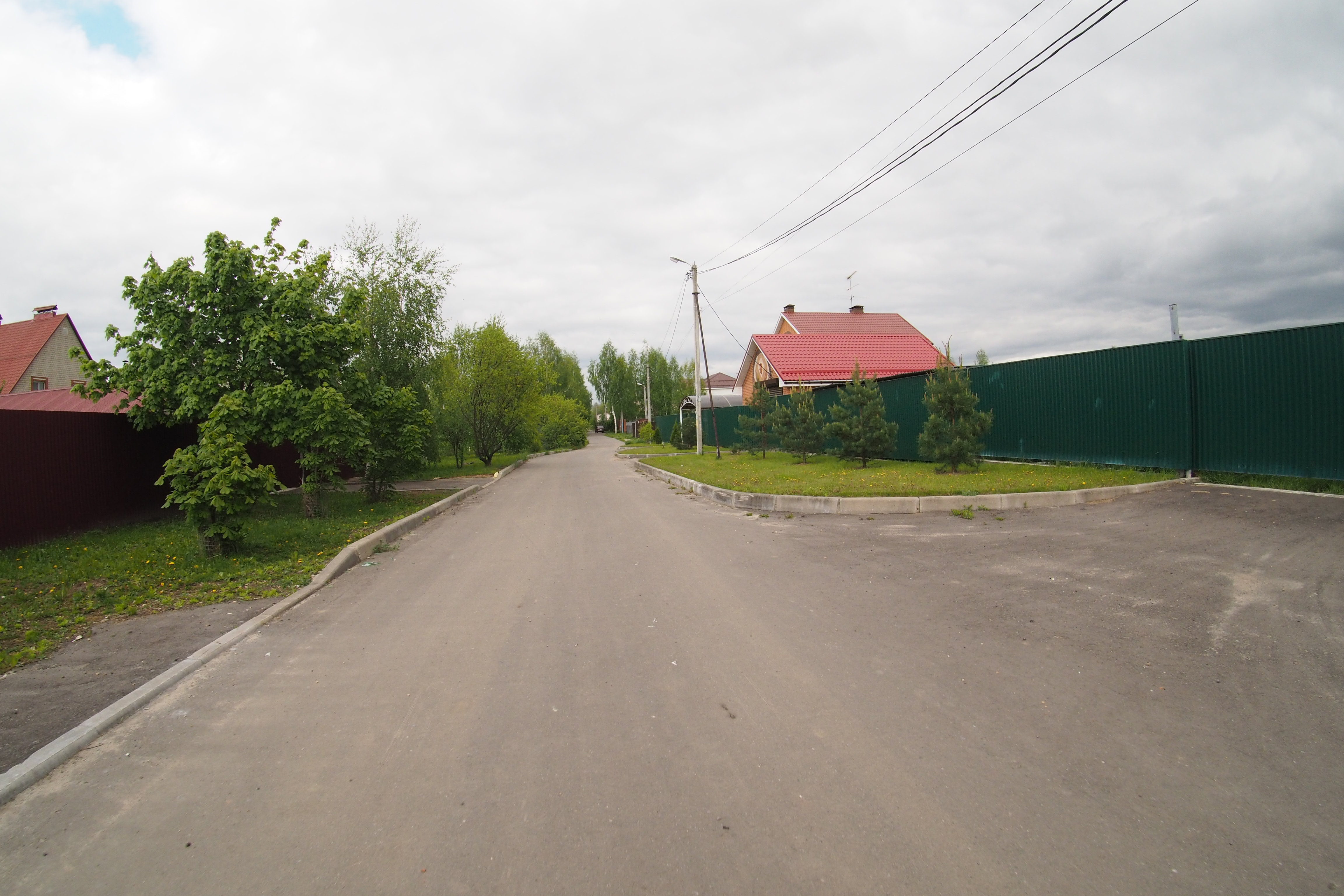 Новохаритоново